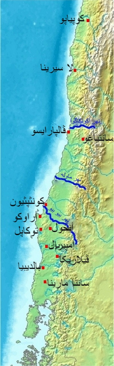 خريطة المُستعمرات الإسپانيَّة في التشيلي ما بين سنتيّ 1540 و1553.